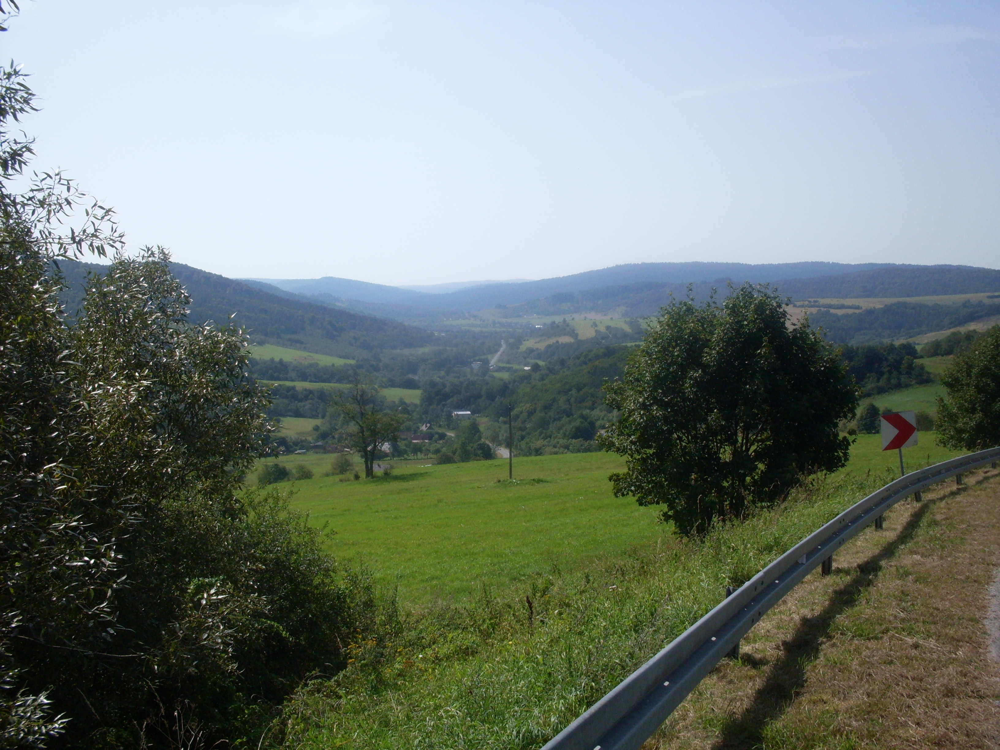 Widok na Bieszczady Zachodnie z serpentyn w miejscowości Kulaszne